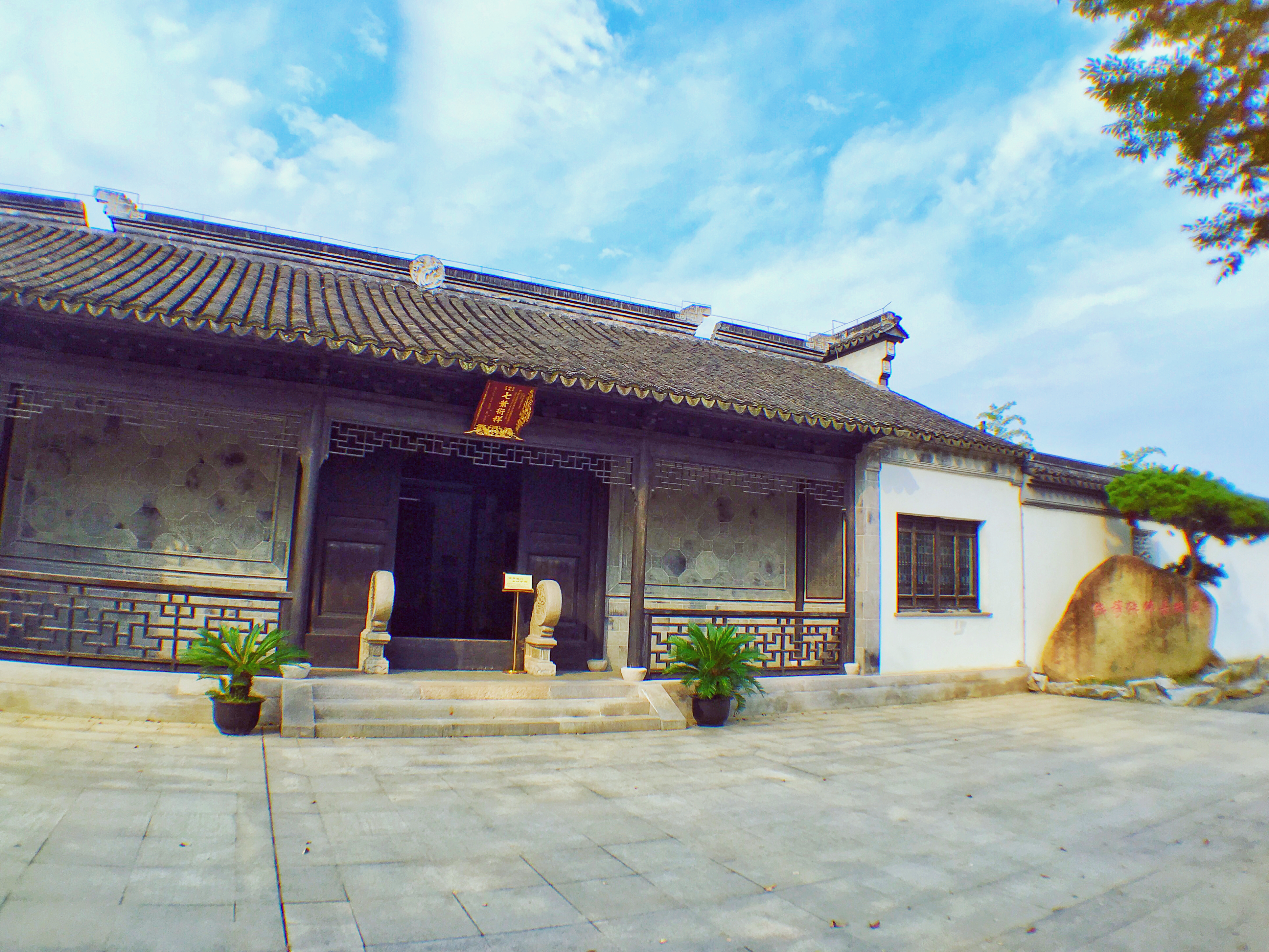 無錫七房橋錢穆故居外景。